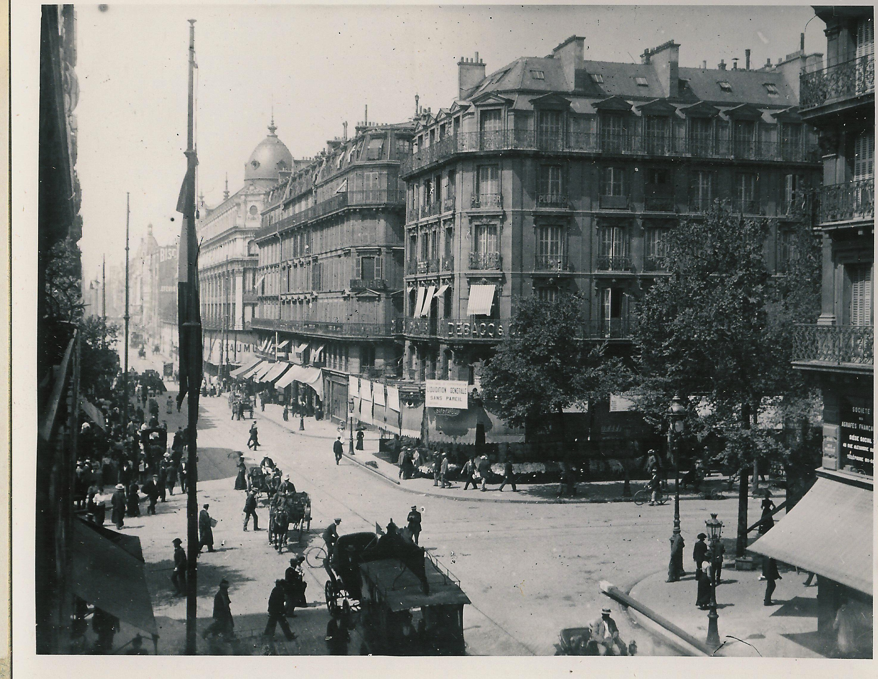 Copie de photographie argentique, Maison Debacq au 105 boulevard Sébastopol, à l'angle de la rue Réaumur, vers 1900